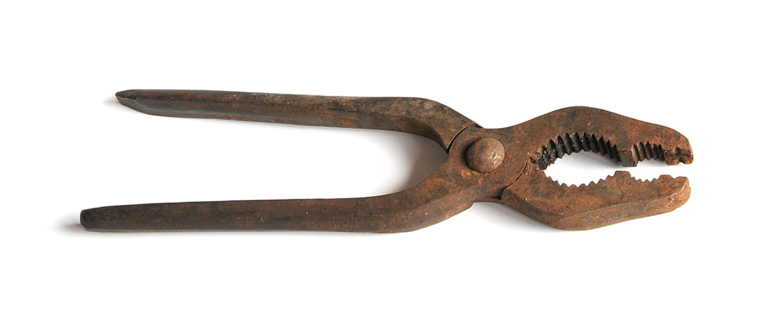 Старые пассатижи